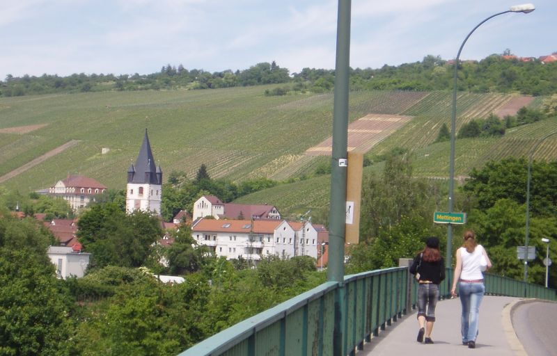 Esslingen am Neckar - Mettingen von der Hanns-Martin-Schleyer-Brücke aus gesehen Fotografiert: selbst